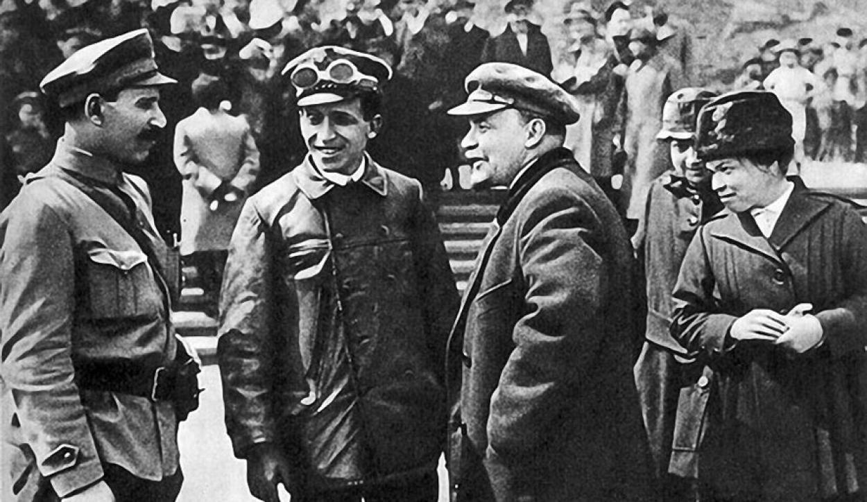 Szamuely és Lenin Moszkvában a Vörös téren 1919 májusában